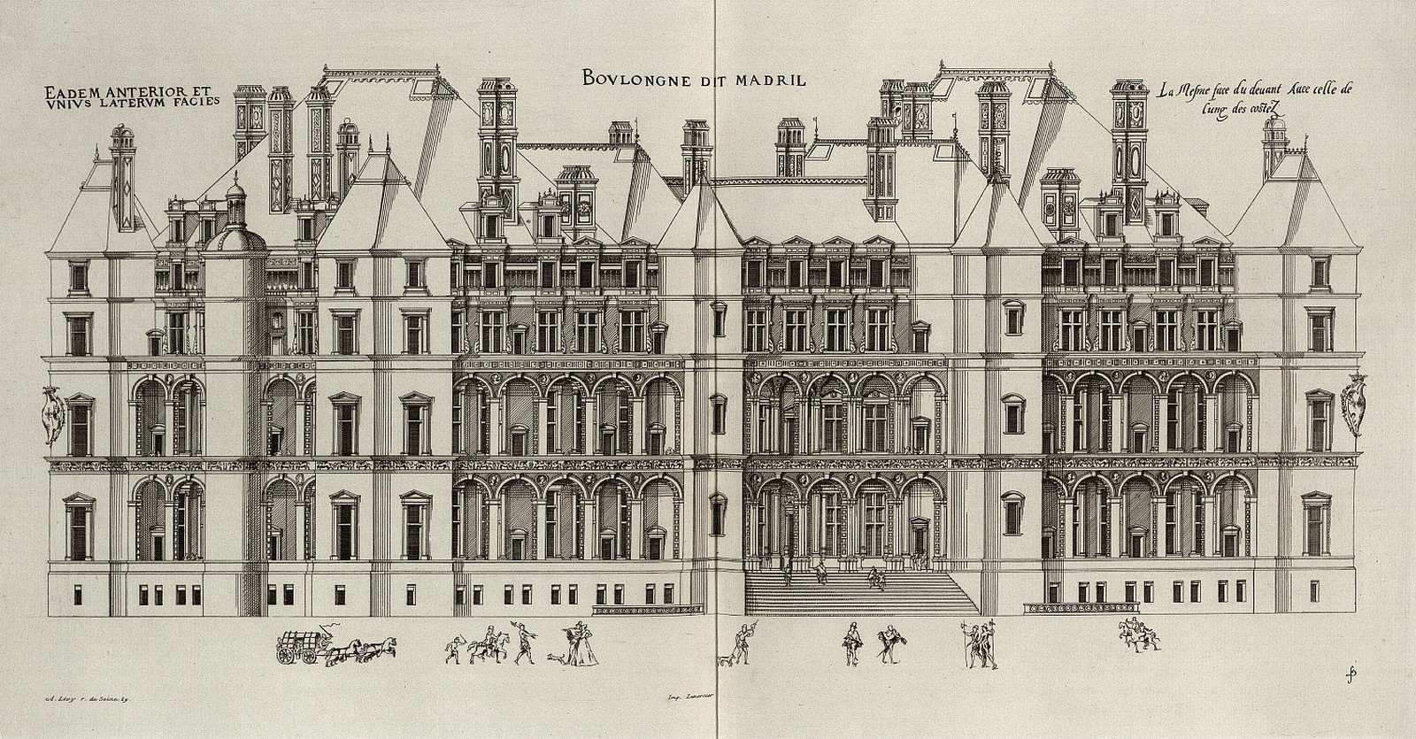 Face avant et un des cotés du chateau de Madrid, tirés de l'ouvrage d'Androuet du Cerceau Les plus excellents bastiments de France